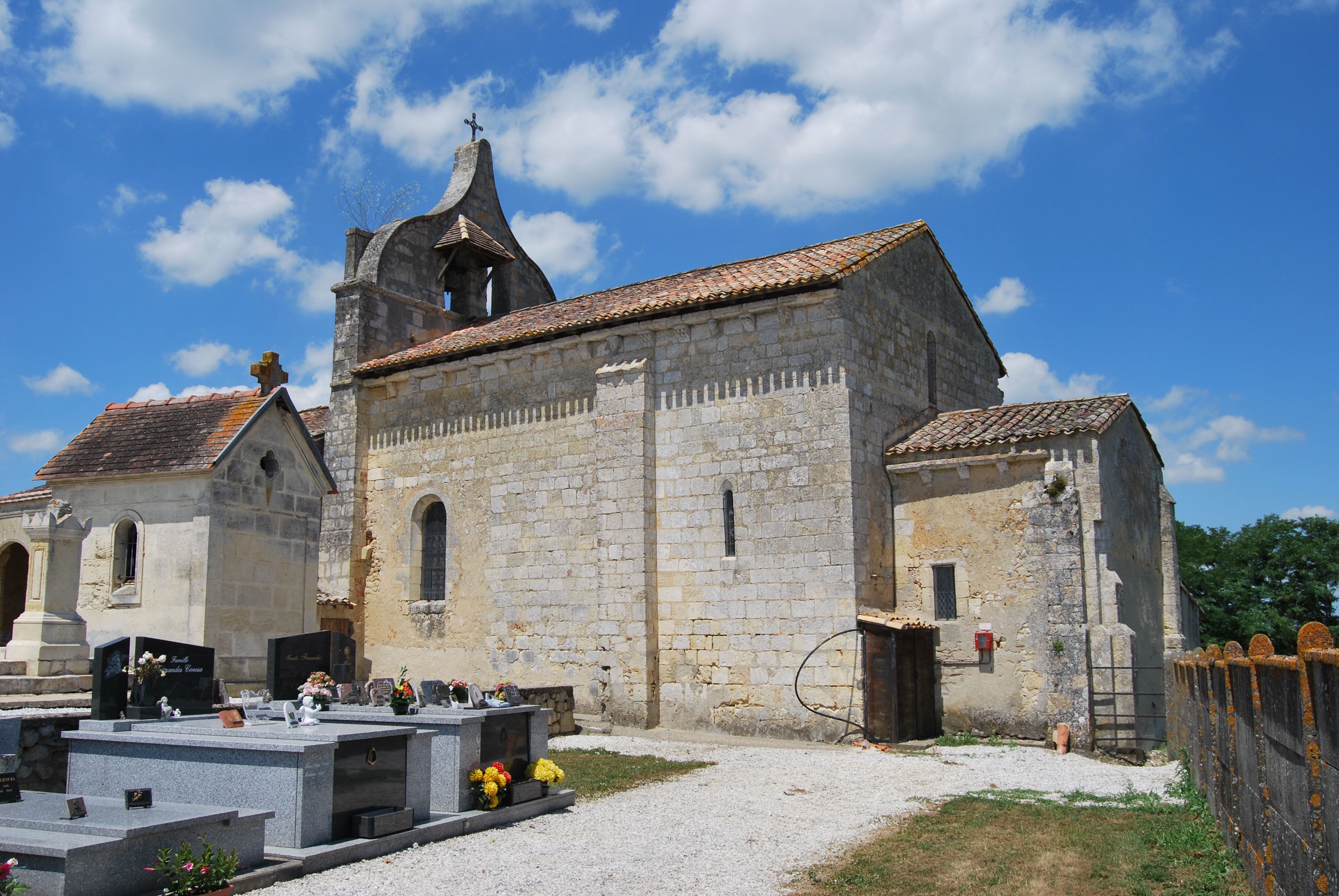 Loupes église St Etienne